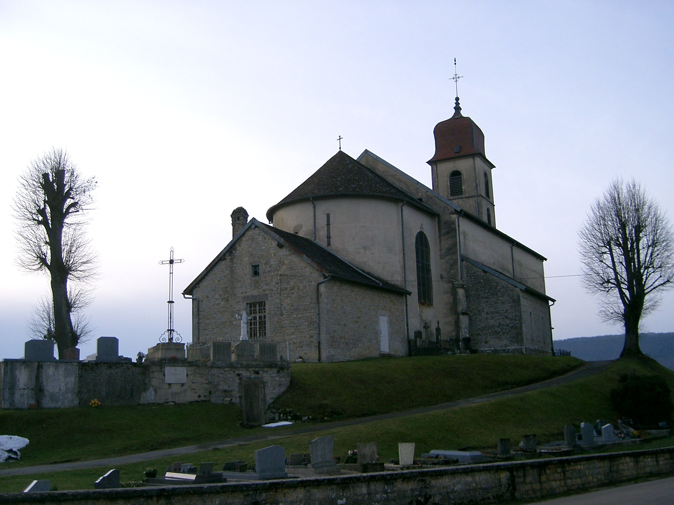 Monnet-la-Ville - nef de l'église sur sa butte (département du Jura, France)